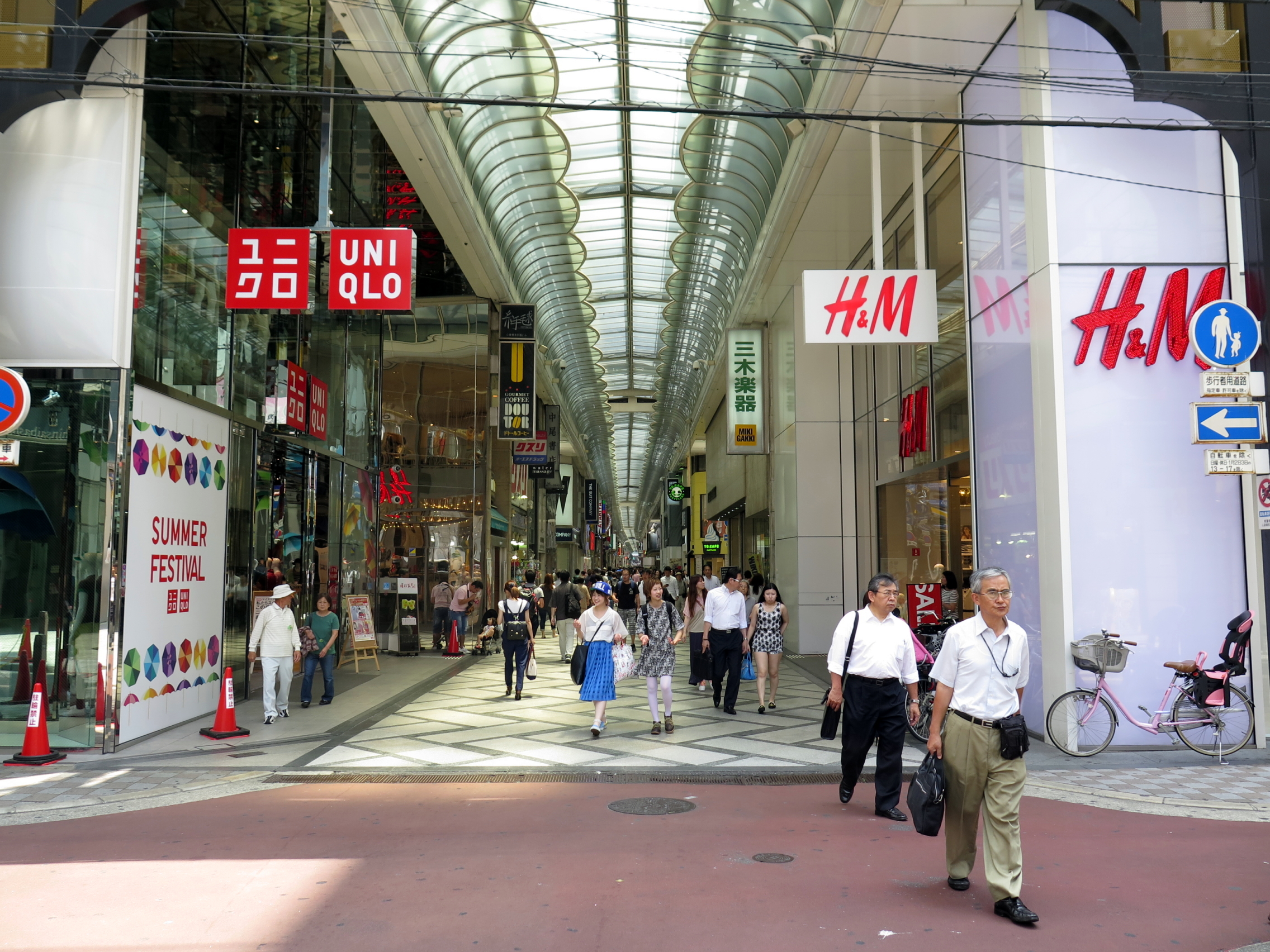 Shinsaibashi Day view